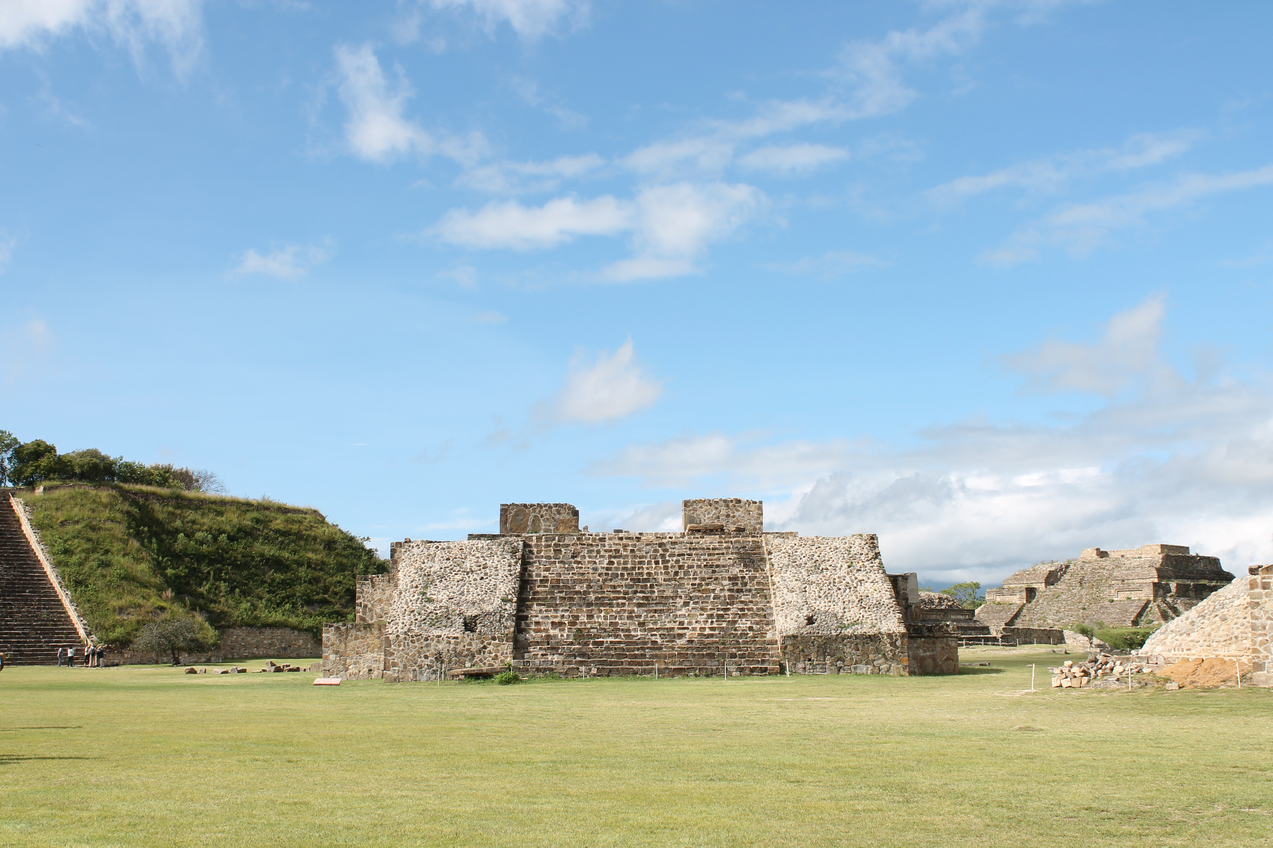 Vista frontal del observatorio de Monte Albán. La imagen muestra la escalinata de piedra que conduce a la parte superior donde aún se preservan algunos muros. En el fondo a la izquierda se aprecia la Plataforma Sur y al fondo a la derecha se alcanza a ver el Sistema M. El observatorio es también llamado Edificio J.